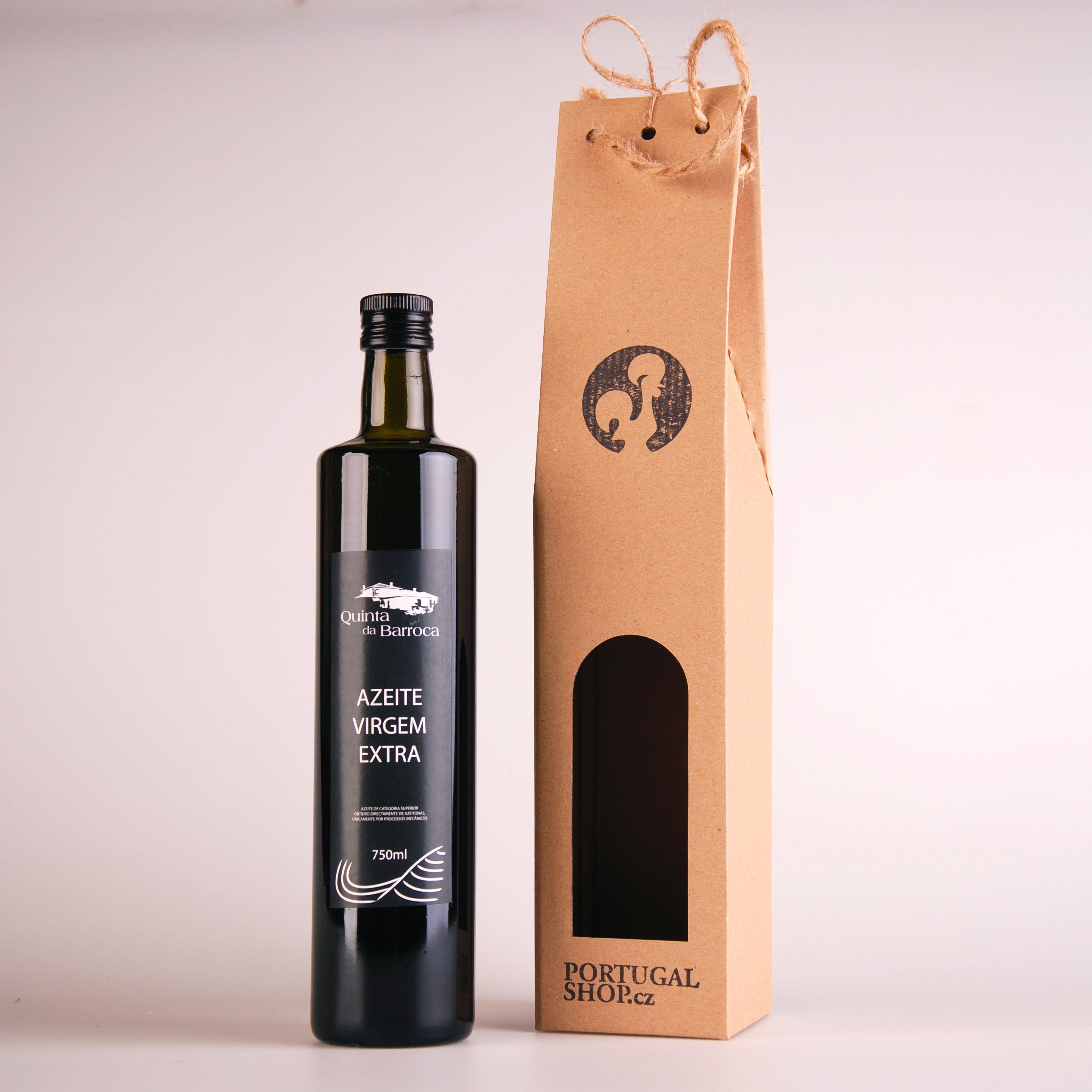 Portugalshop-olivovy-olej-extra-panensky-750ml